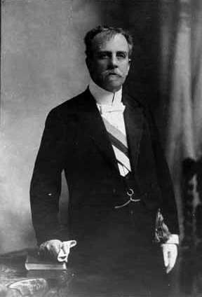 Retrato del vicepresidente Anibal Zañartu.